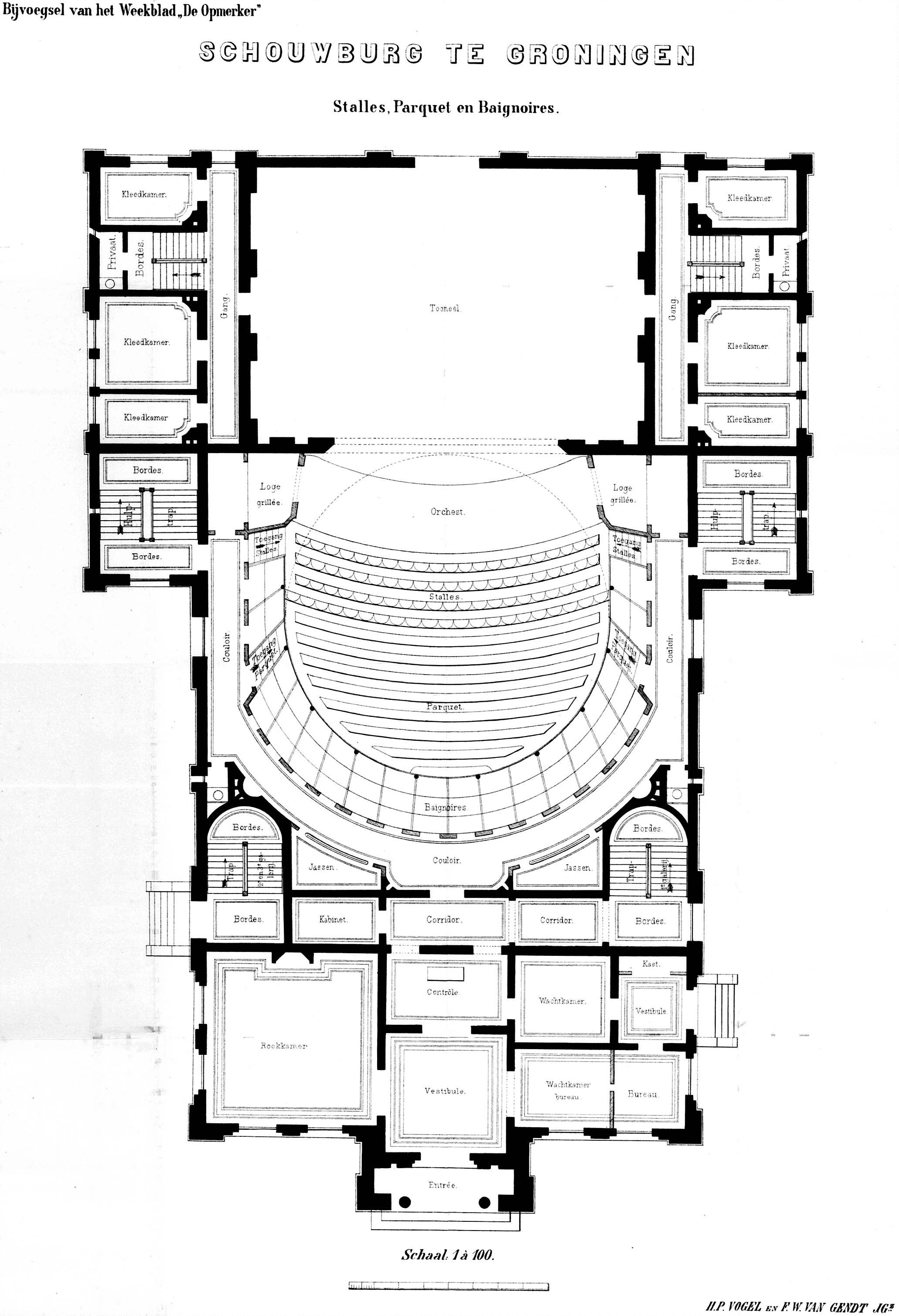 H.P. Vogel & F.W. (Frederik Willem) van Gendt. Stadsschouwburg, Turfsingel, Groningen. 1867-1883 (?). Afkomstig uit De Opmerker, 3e jaargang, nummer 16 (18 april 1868): bijvoegsel.